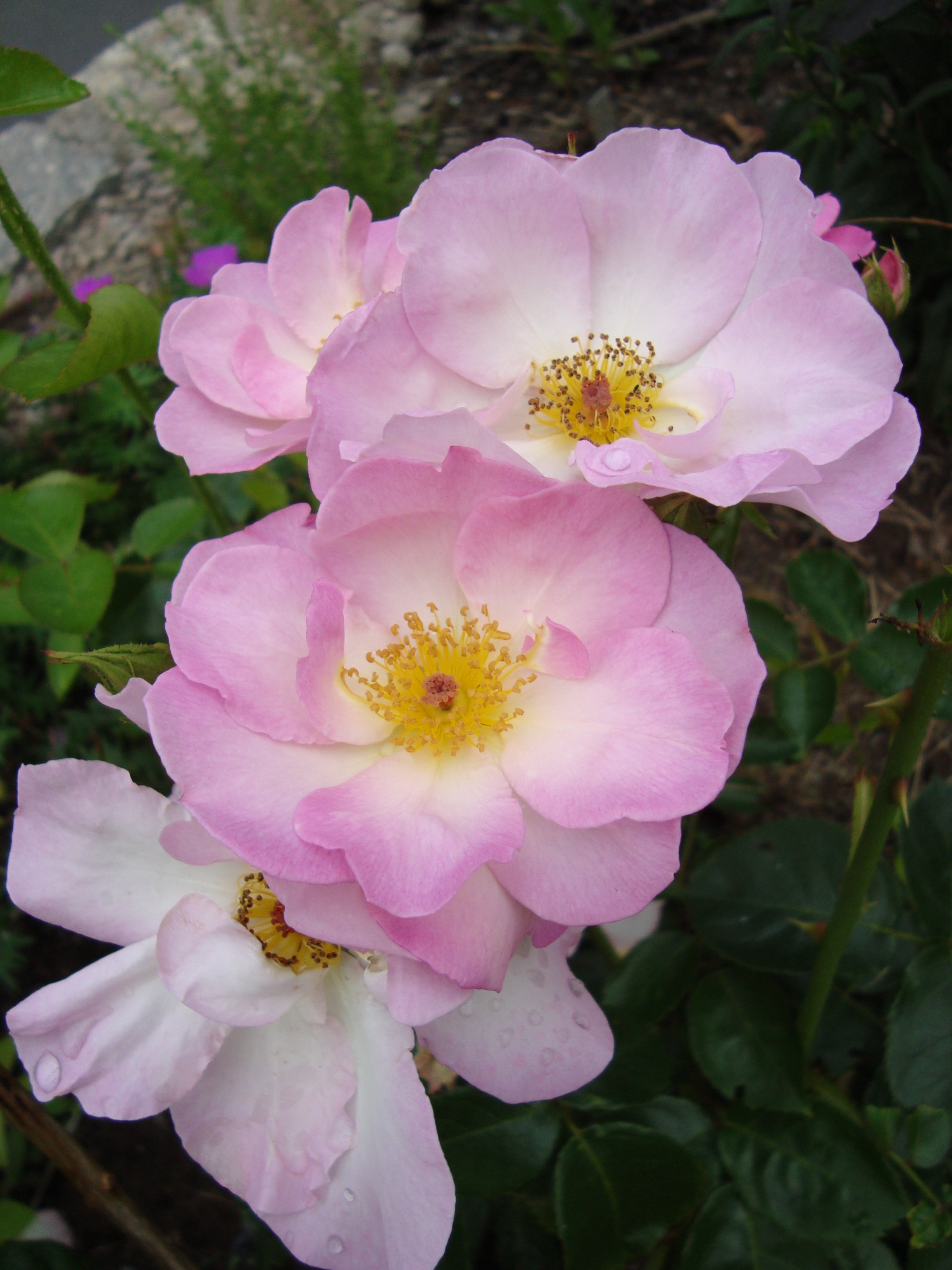 Rosa Floribunda Group 'Escapade'